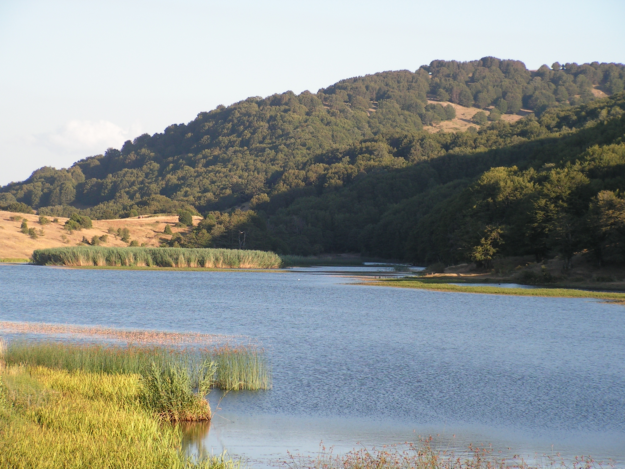 Lombardo Dario Ignazio, Lago Biviere